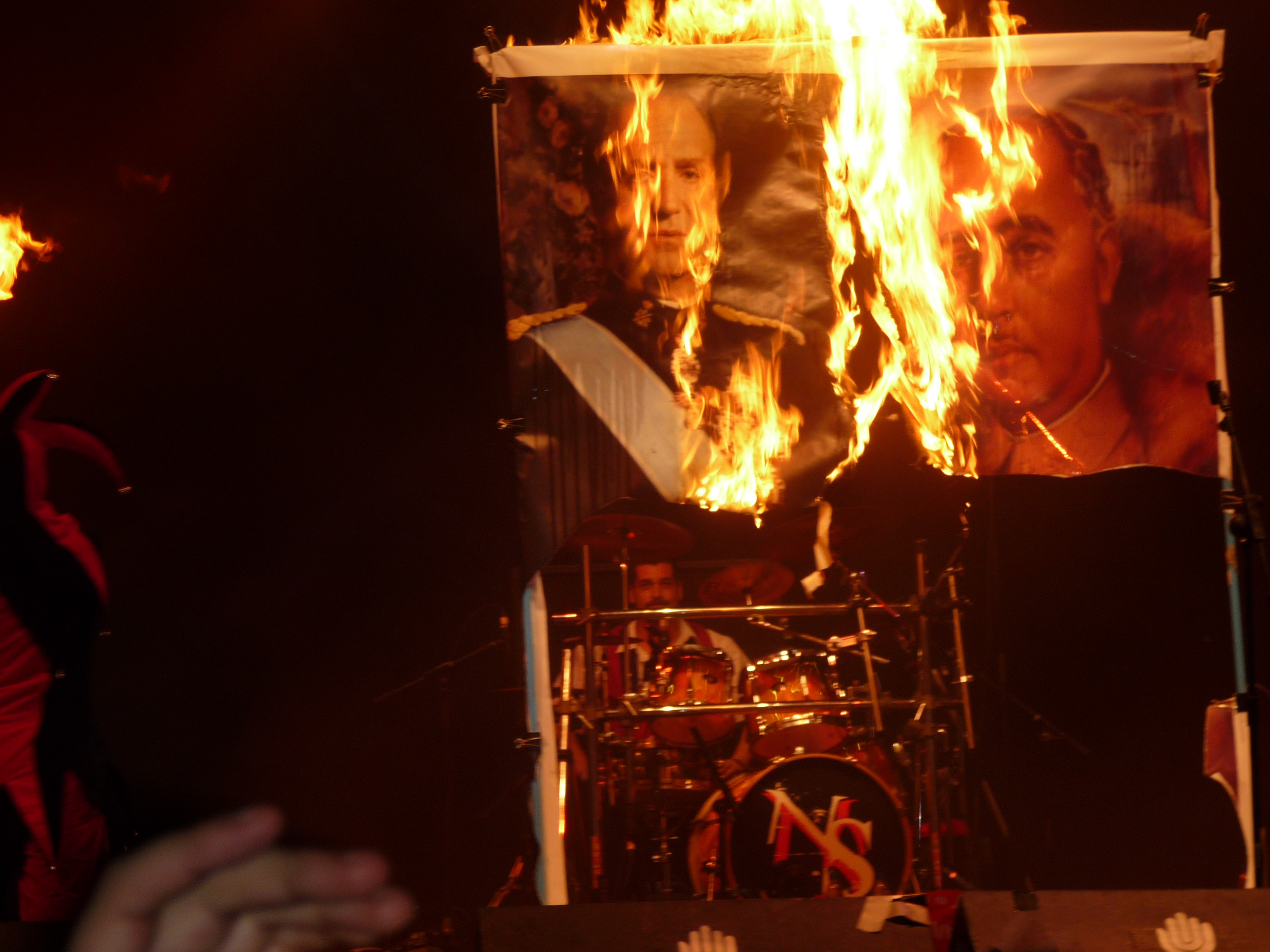 Polémica actuación de El Noi del Sucre en Extremúsica 2009 quemando una imagen de Francisco Franco y el rey de España Juan Carlos I.